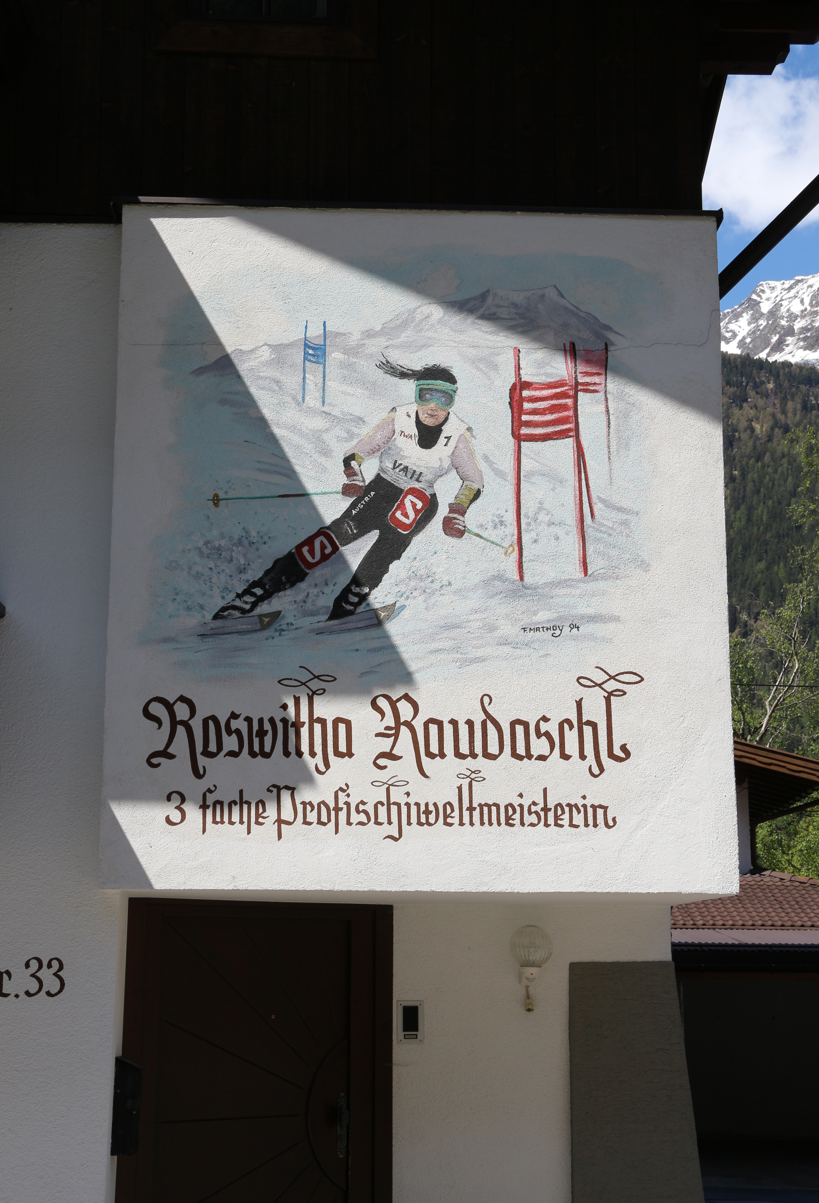 Wandmalerei der Skifahrerin Roswitha Raudaschl in Längenfeld, Ötztal, Tirol.